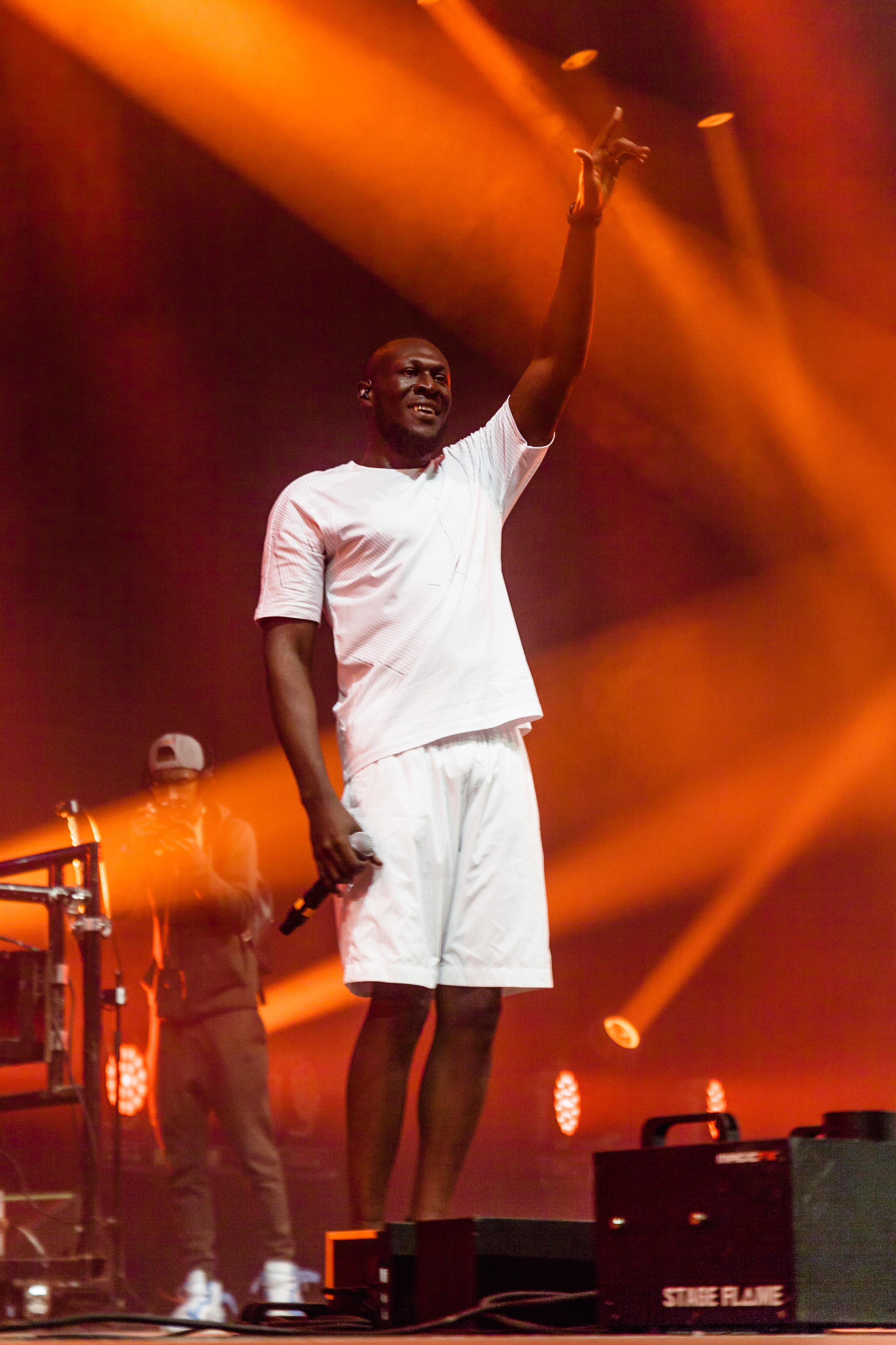 Festivalsommer This photo was created with the support of donations to Wikimedia Deutschland in the context of the CPB project "Festival Summer".